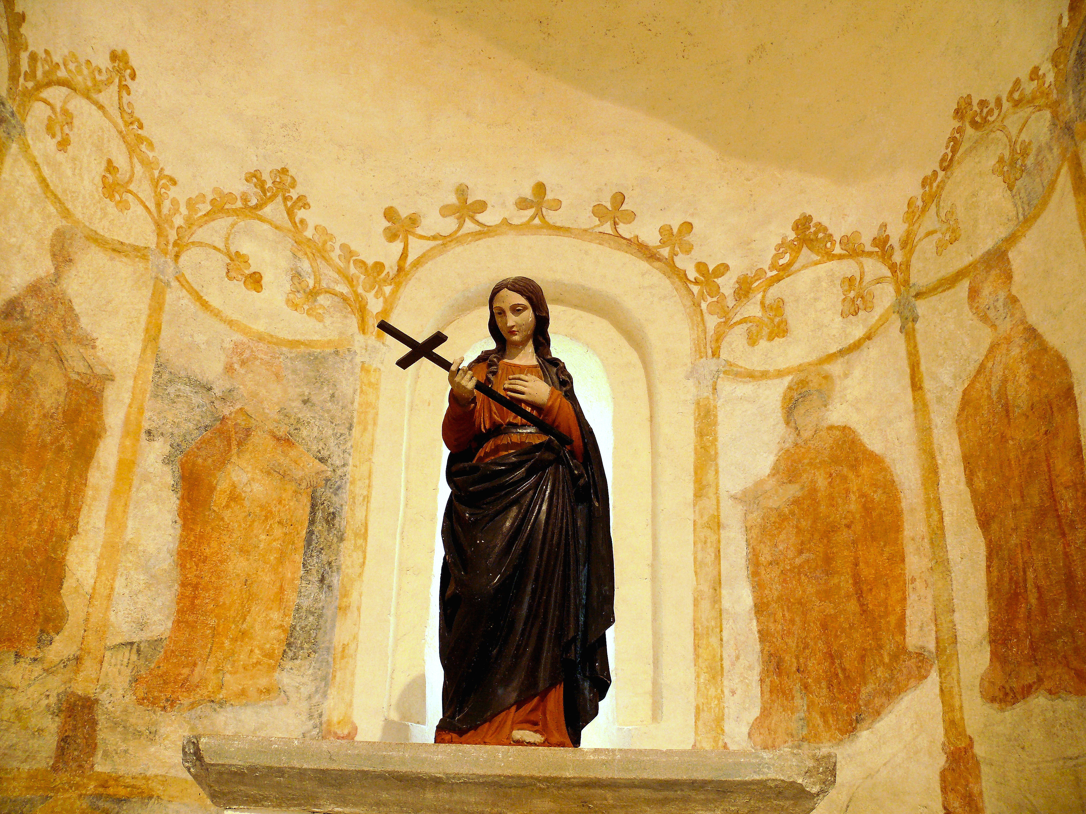 Malay - Eglise Notre-Dame - Absidiole nord